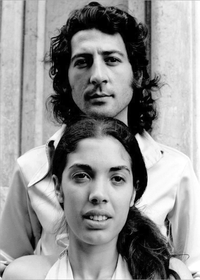 Lole (abajo) y Manuel Molina (arriba)